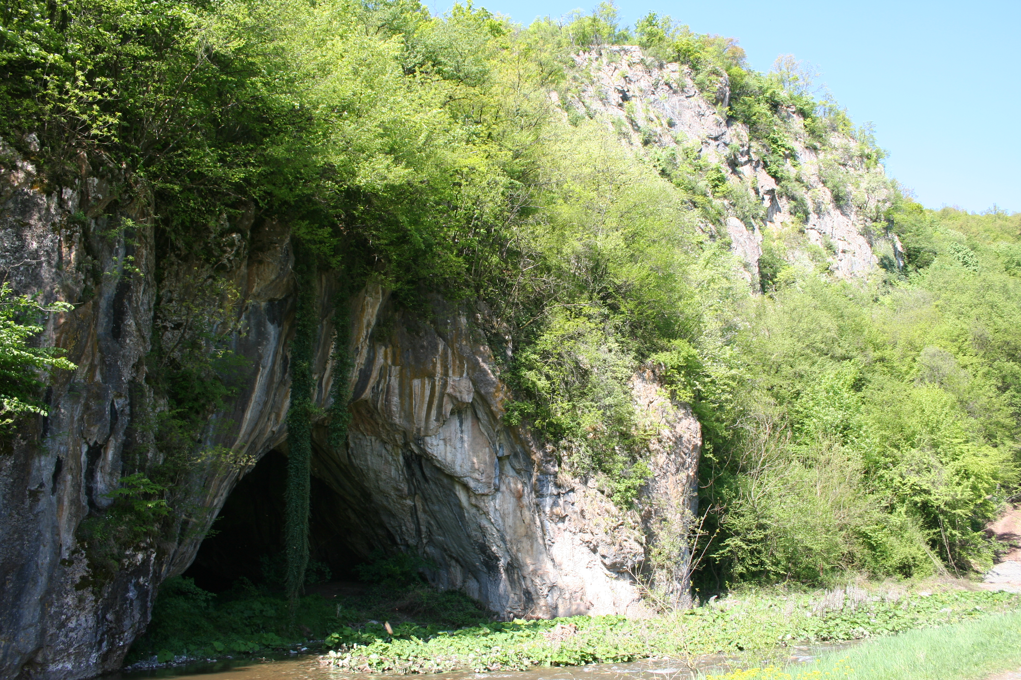 Spomenik prirode Ribnica - Velika ribnička pećina Ово је фотографија заштићеног природног добра у Србији под шифром: СП206 This is a a photo of a natural area in Serbia with ID: СП206